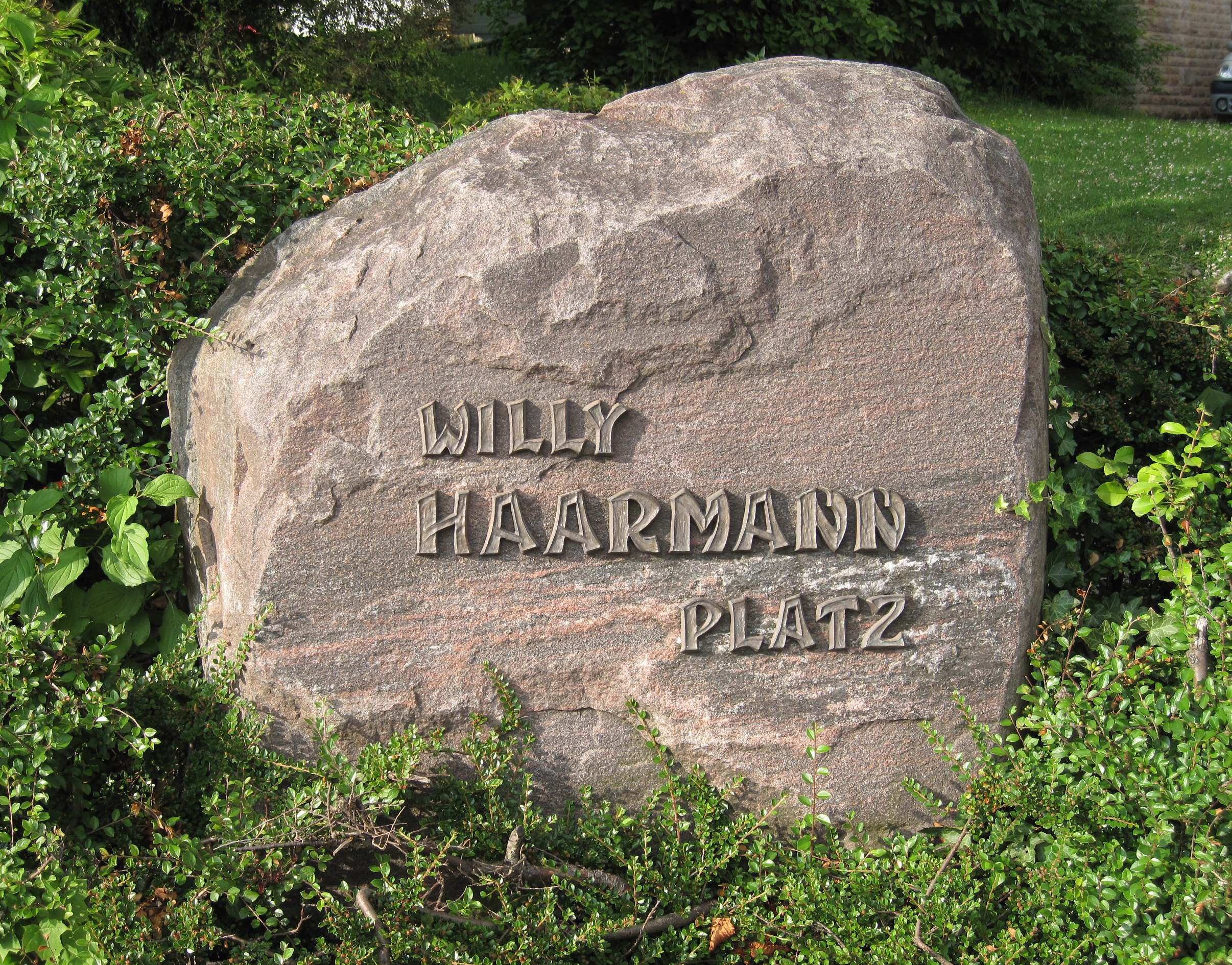 Willy-Haarmann-Platz (Gedenkstein) im Iserlohner Stadtteil Letmathe-Stübbeken.